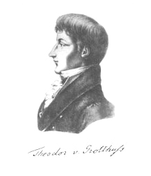 Theodor von Grotthuß (1785–1822). Zeitgenössische Abbildung.